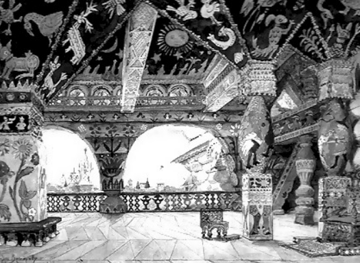 Васнєцов В.М. Палати царя Берендея.